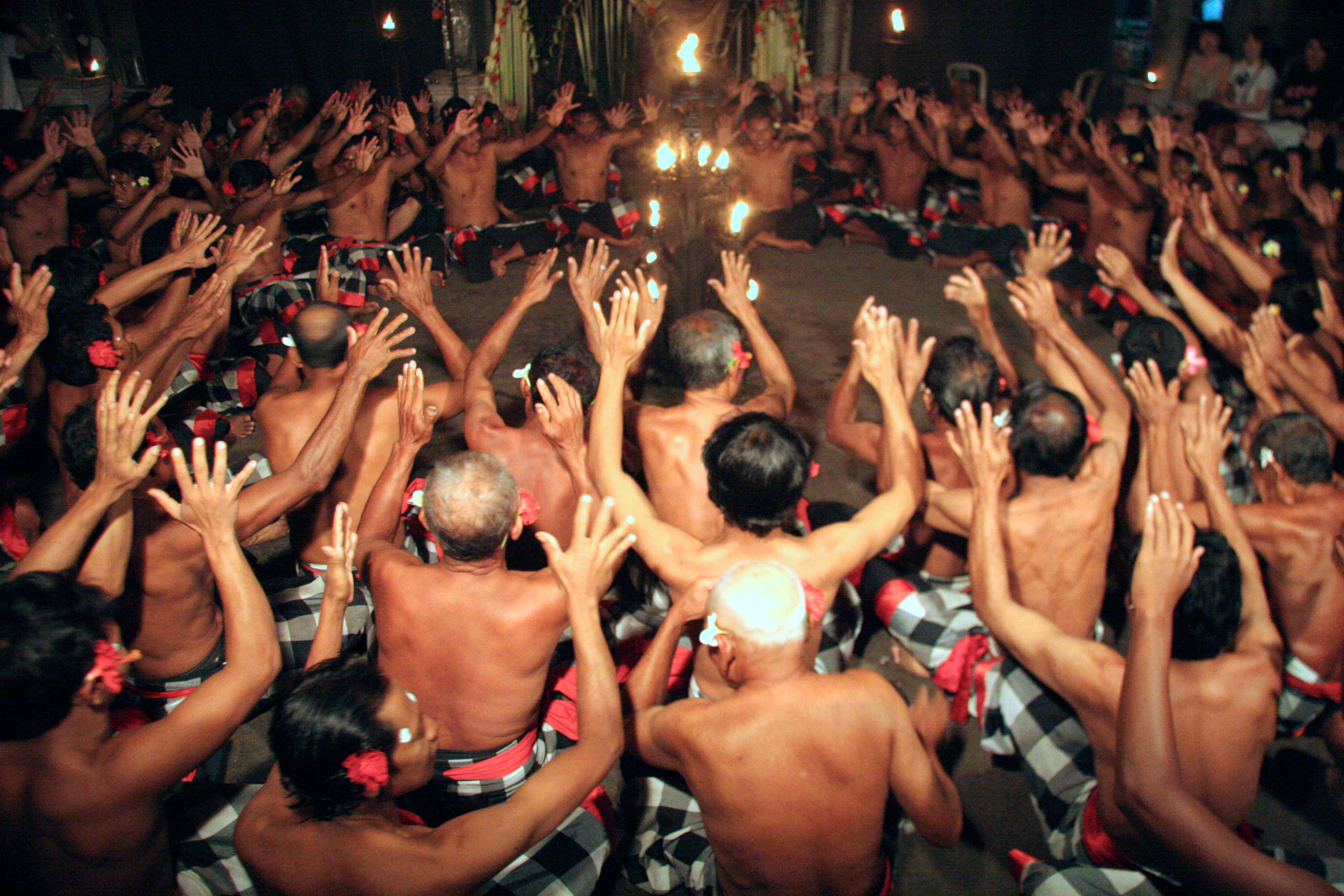 bali ubud danse du kesak